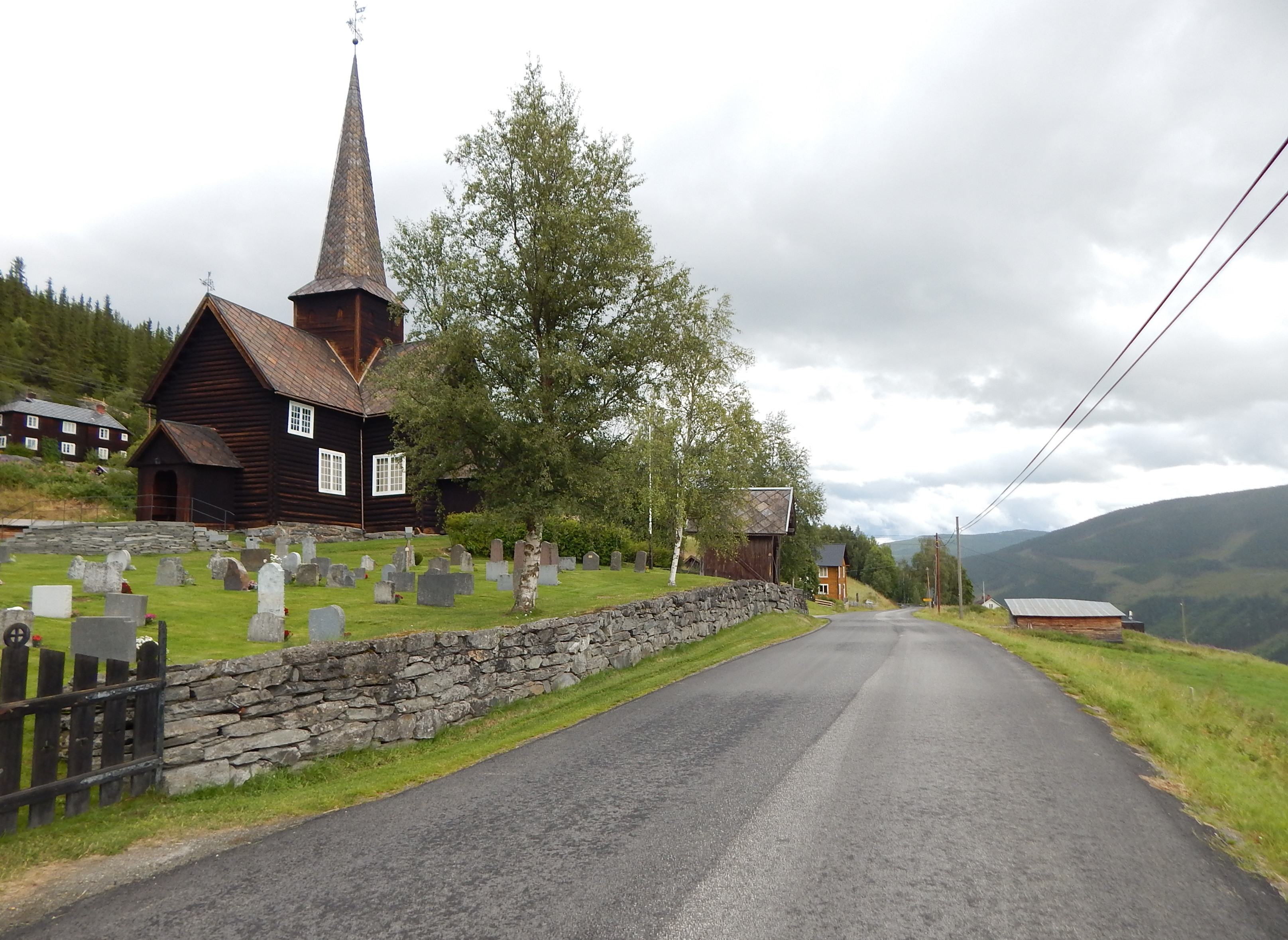 Fylkesvei 255 forbi Kvikne kirke